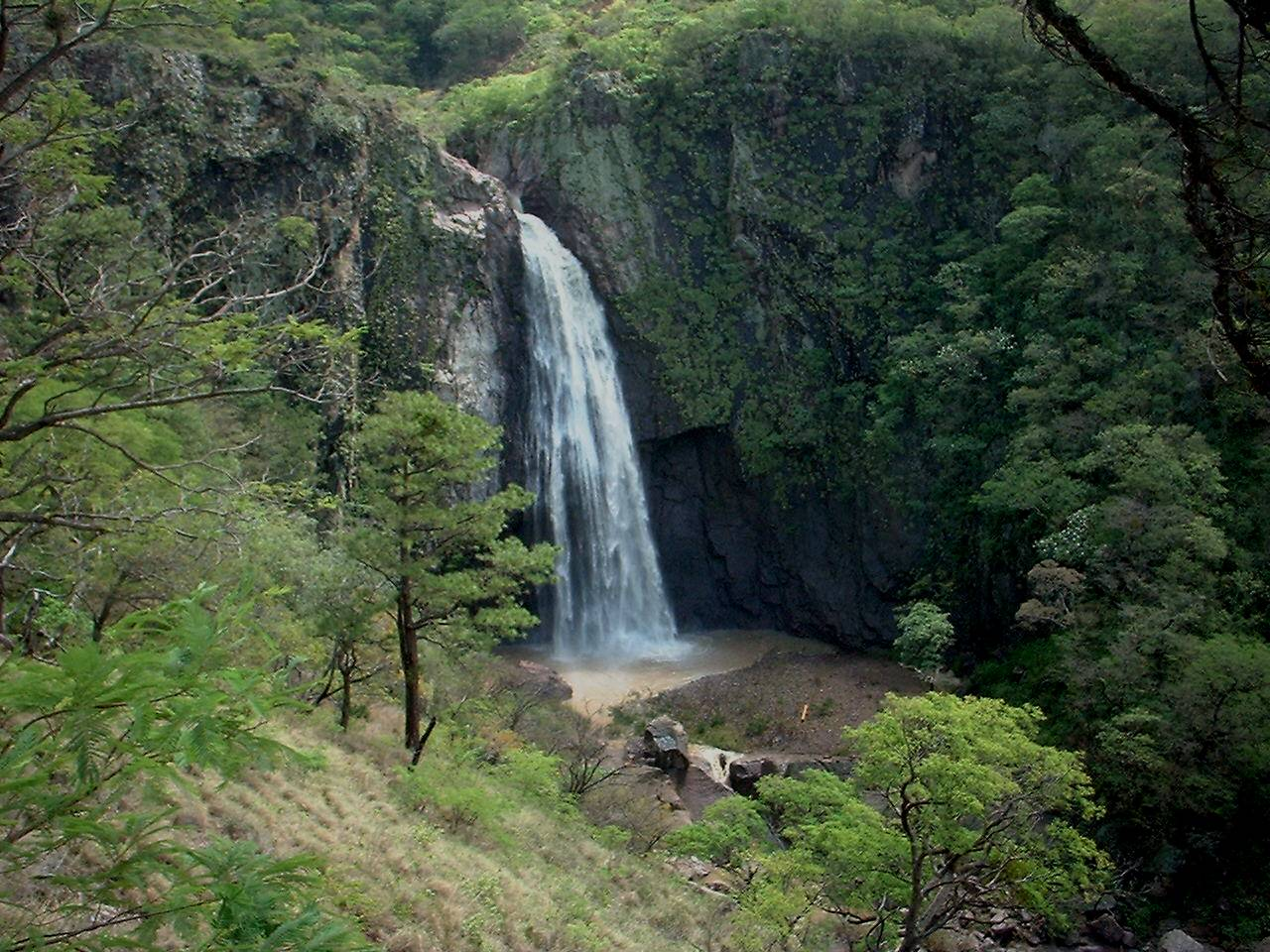 Conjunto de caídas de agua, situadas a unos 50 minutos del centro de San Marcos